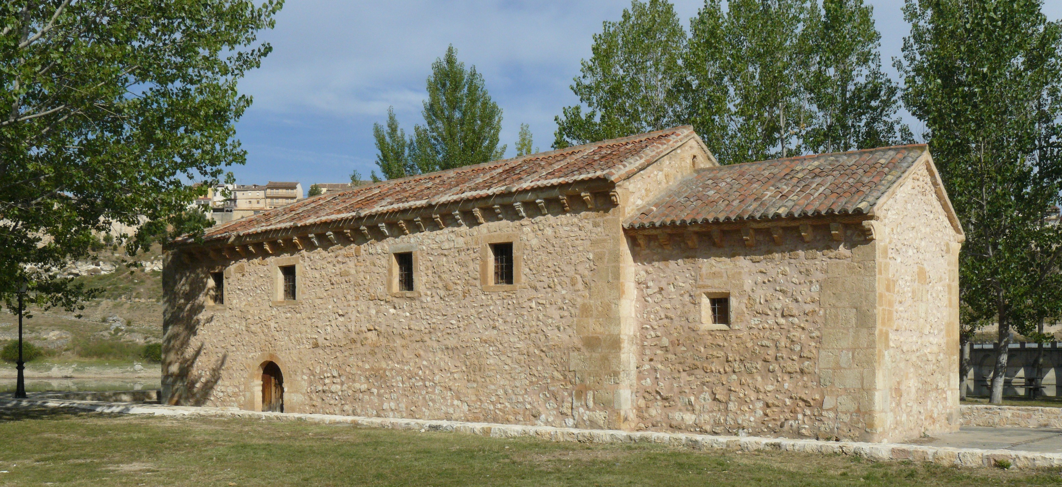 Vista de la ermita románica de la Vera Cruz, Maderuelo, Segovia.